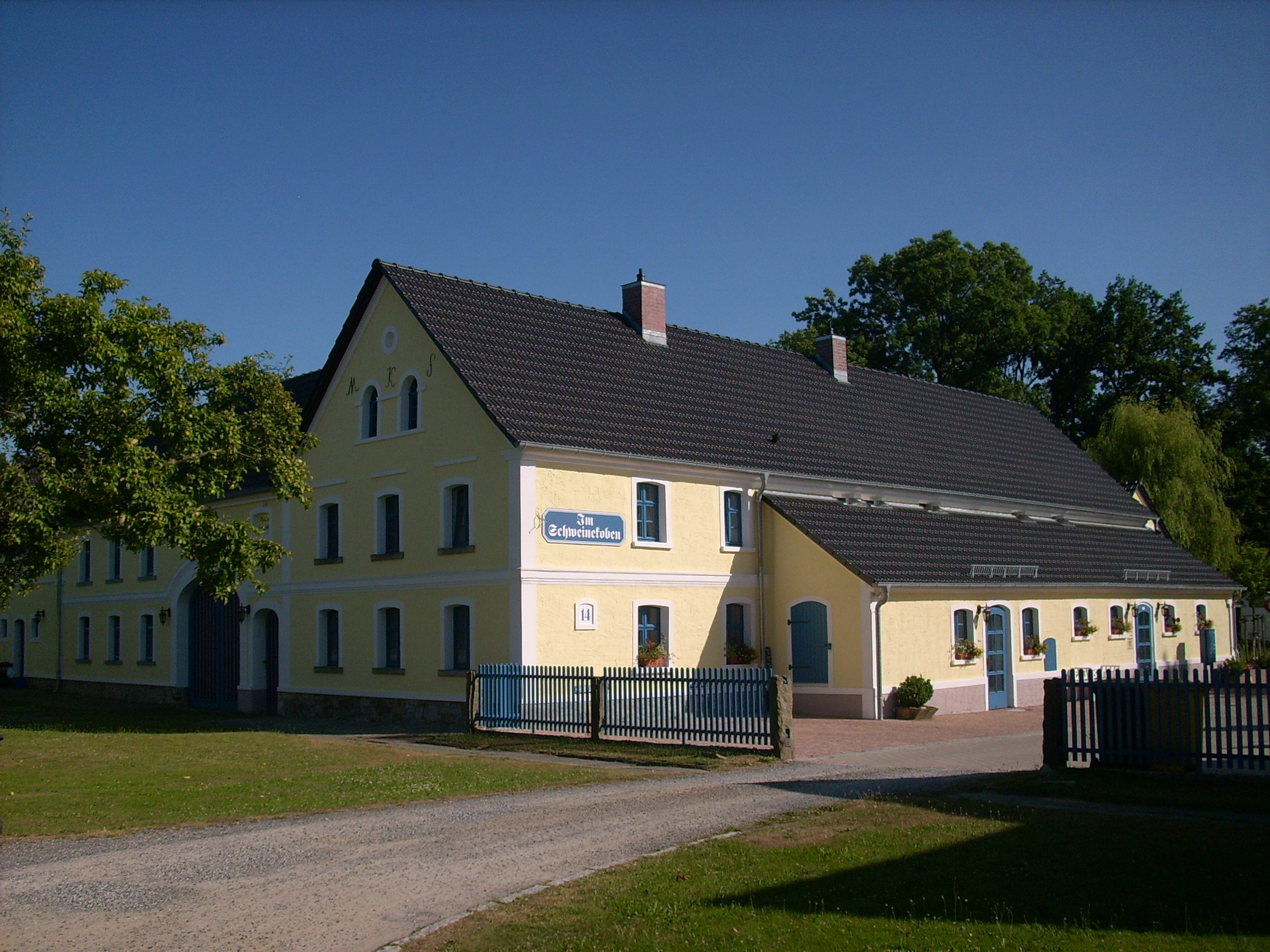 Bauerngut (1879 erbaut, 2011 saniert) in Spohla, Ortsteil von Wittichenau